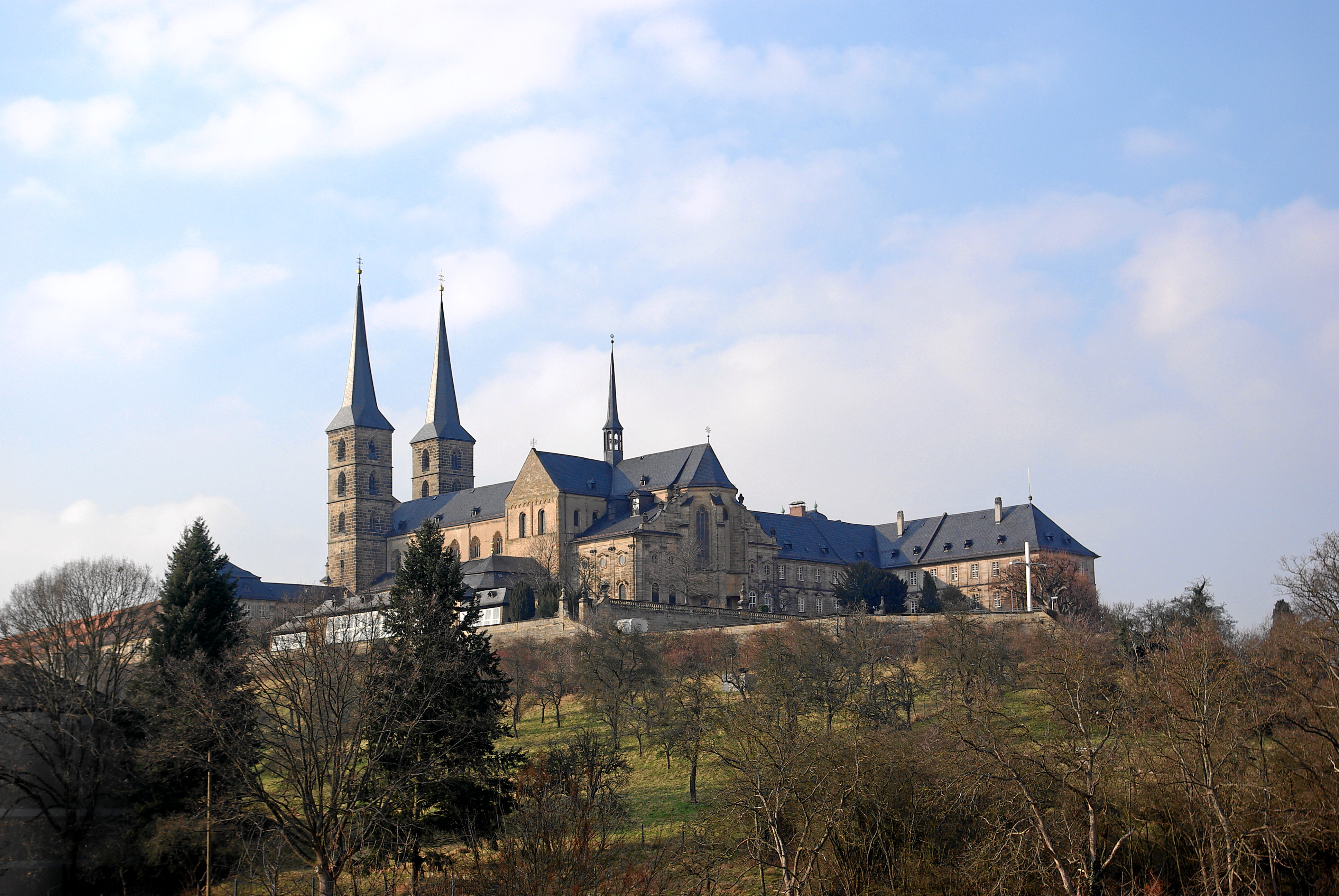 Bamberg, St. Michael vom Rosengarten aus gesehen